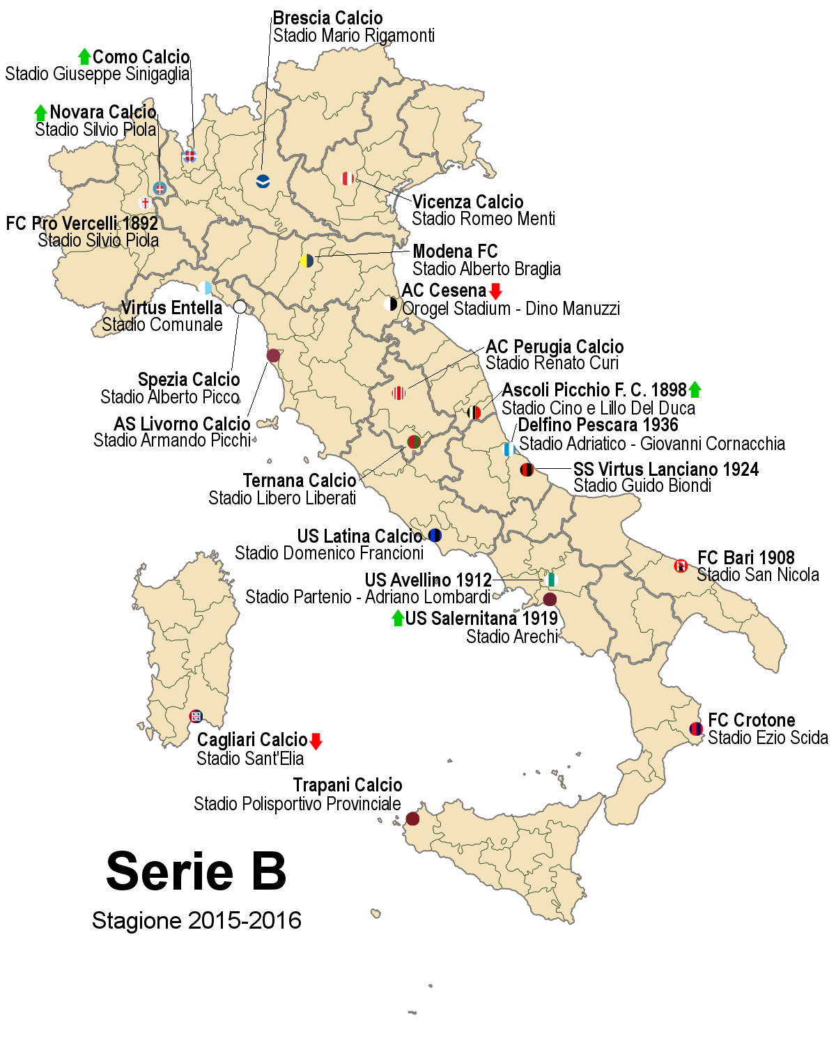 Collocazione delle squadre della Serie B 2015-2016